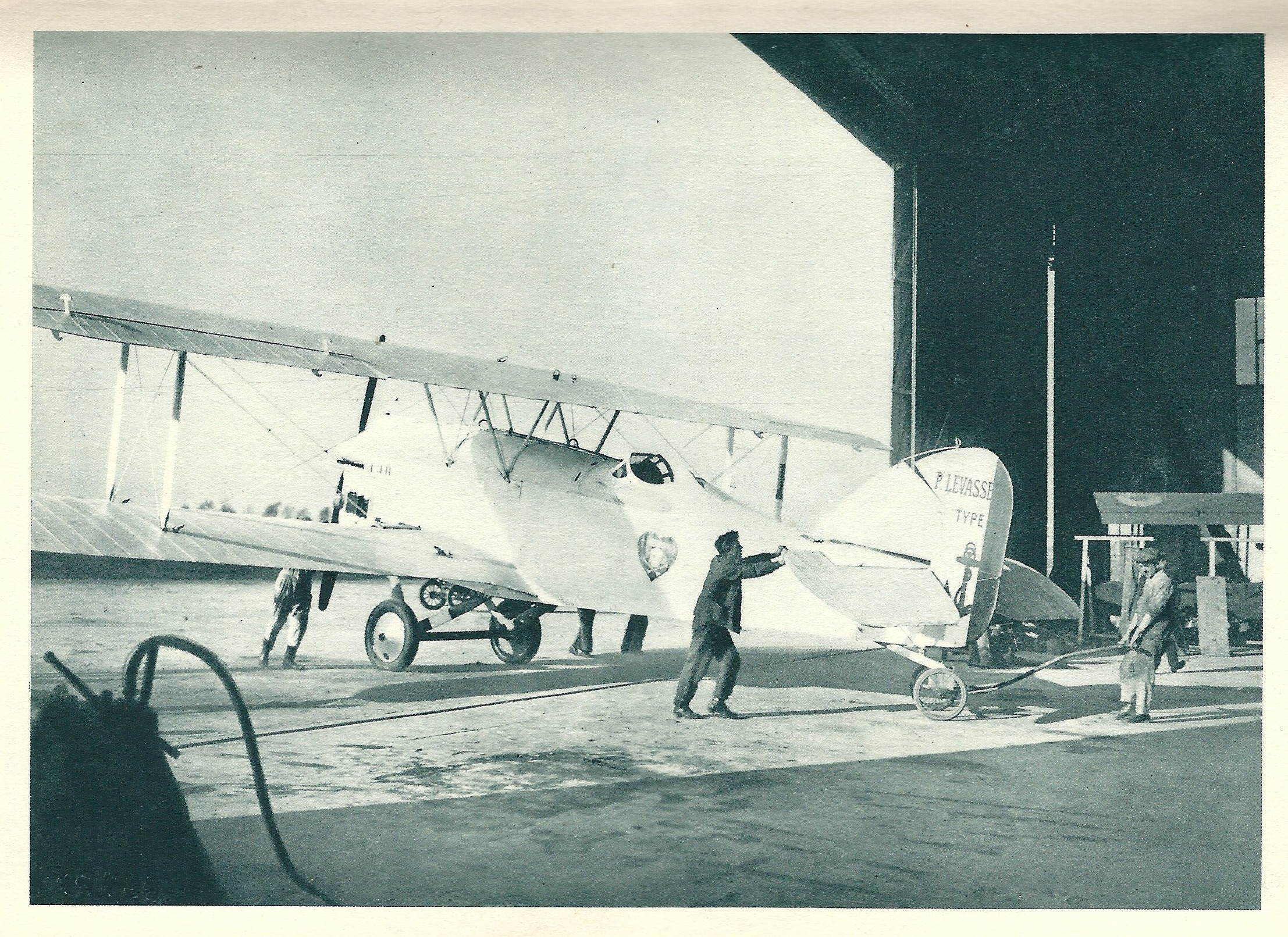 Charles Nungesser ; L'Oiseau blanc dans le hangar Levasseur à l'aérodrome du Bourget